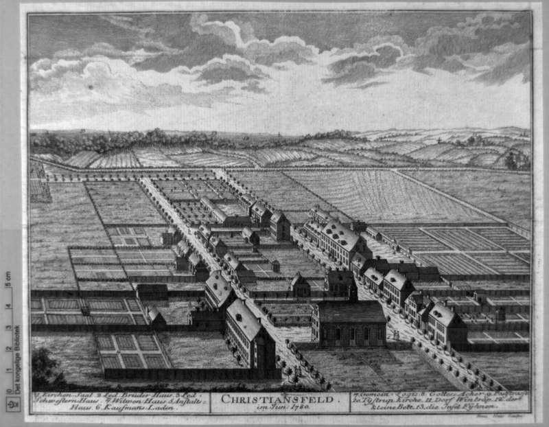 Christiansfeld, 1780. Christiansfeld - Danmark - Sønderjyllands amt - prospekt. Kobberstik.